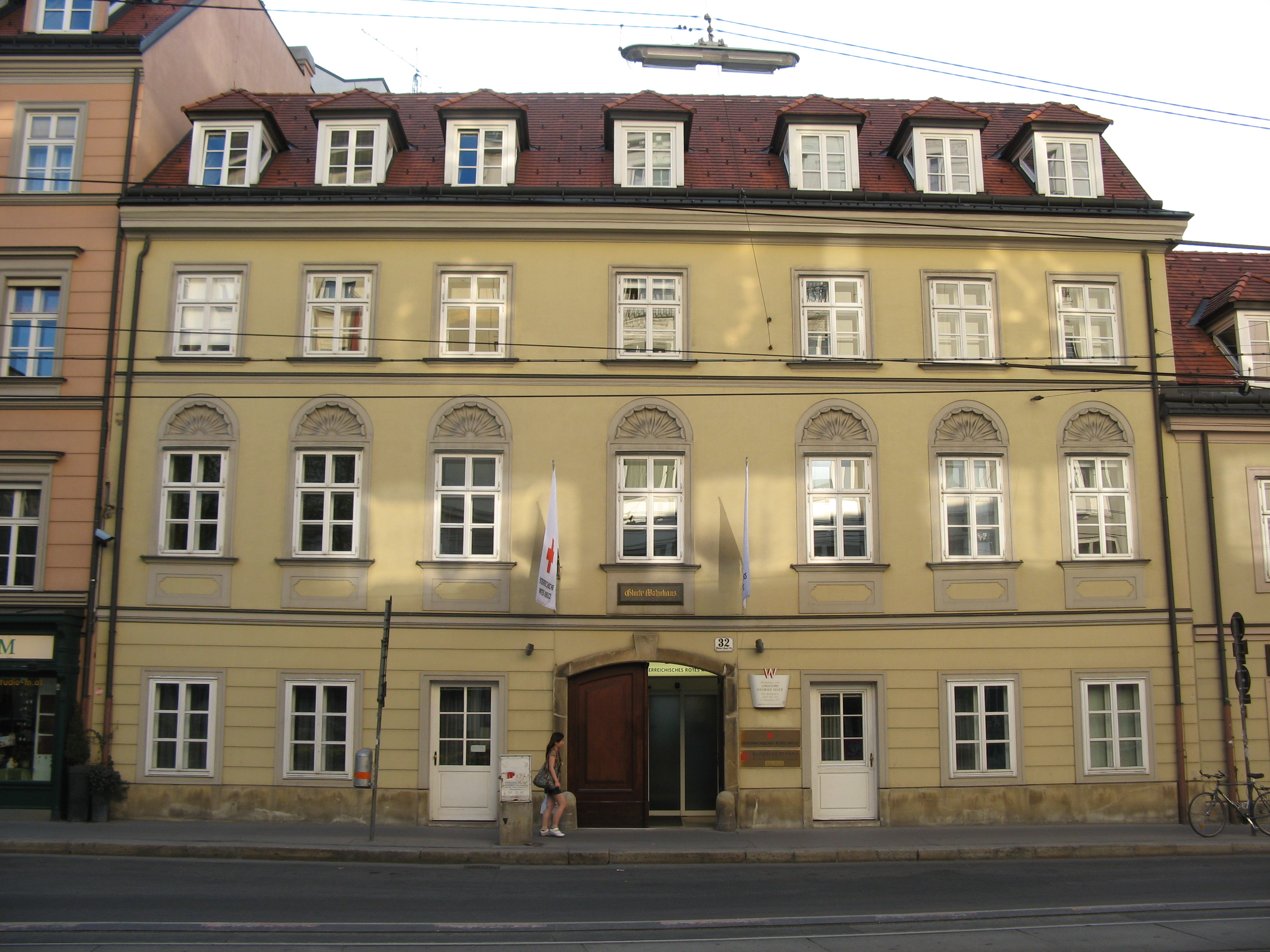 Wohn- und Sterbehaus von Christoph Willibald Gluck, Wiedner Hauptstraße 32, Wien-Wieden